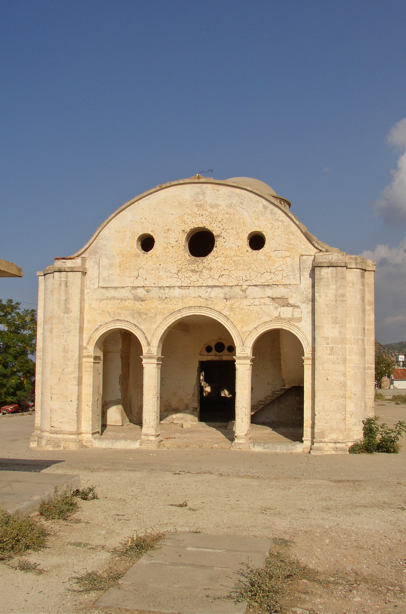 Eingang zur verlassenen orthodoxen Kapelle in Nord Cypern (2003)- vermutlich irgendwo in der Gegend von Tatlisu - Büyükkonuk